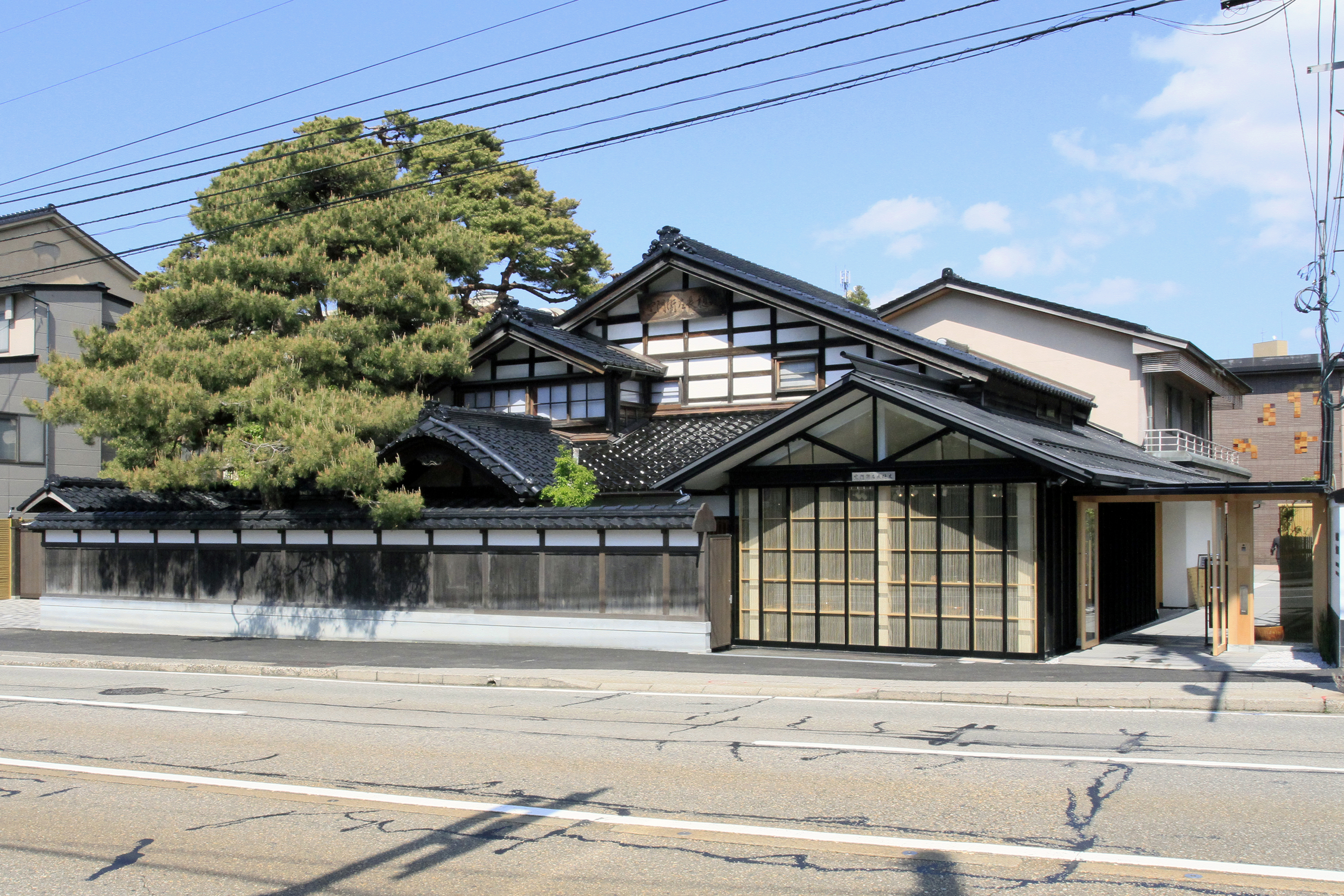 ohimuseum